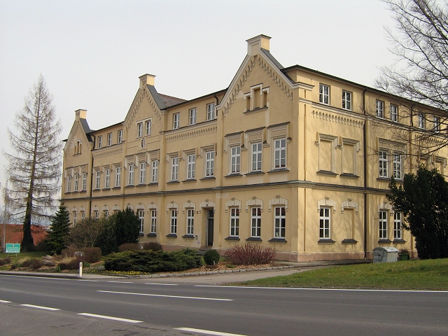 LWBFS Ritzlhof, Ansfelden, Upper Austria